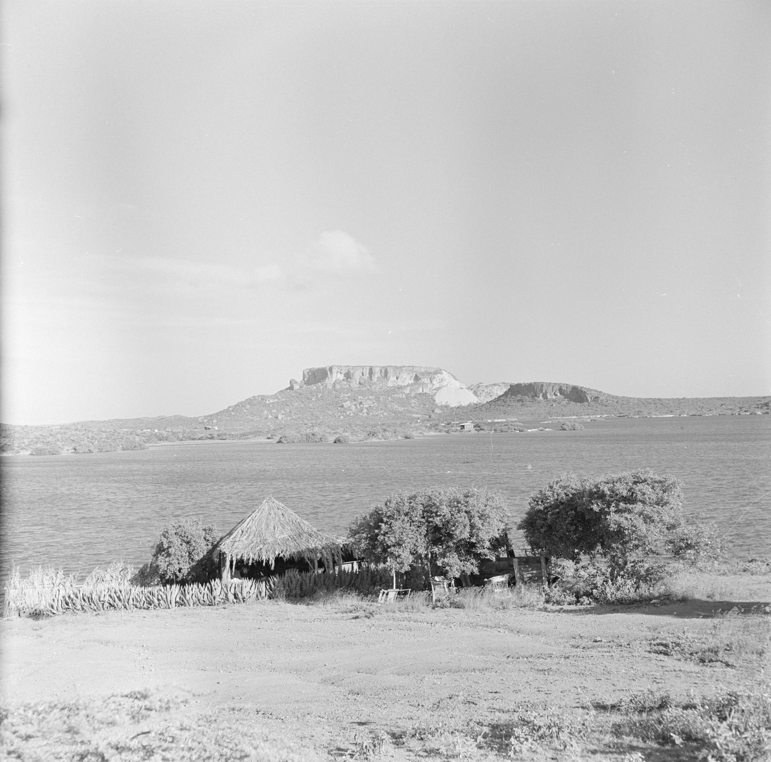 Collectie / Archief : Fotocollectie Van de Poll Reportage / Serie : Nederlandse Antillen en Suriname ten tijde van het koninklijk bezoek van koningin Juliana en prins Bernhard in 1955 Beschrijving : De Tafelberg te Curaçao Annotatie : De Tafelberg is 1026 m. hoog Datum : 1 oktober 1955 Locatie : Curaçao Trefwoorden : bergen, landschappen Fotograaf : Poll, Willem van de, [onbekend] Auteursrechthebbende : Nationaal Archief Materiaalsoort : Negatief (zwart/wit) Nummer archiefinventaris : bekijk toegang 2.24.14.02 Bestanddeelnummer : 252-2317